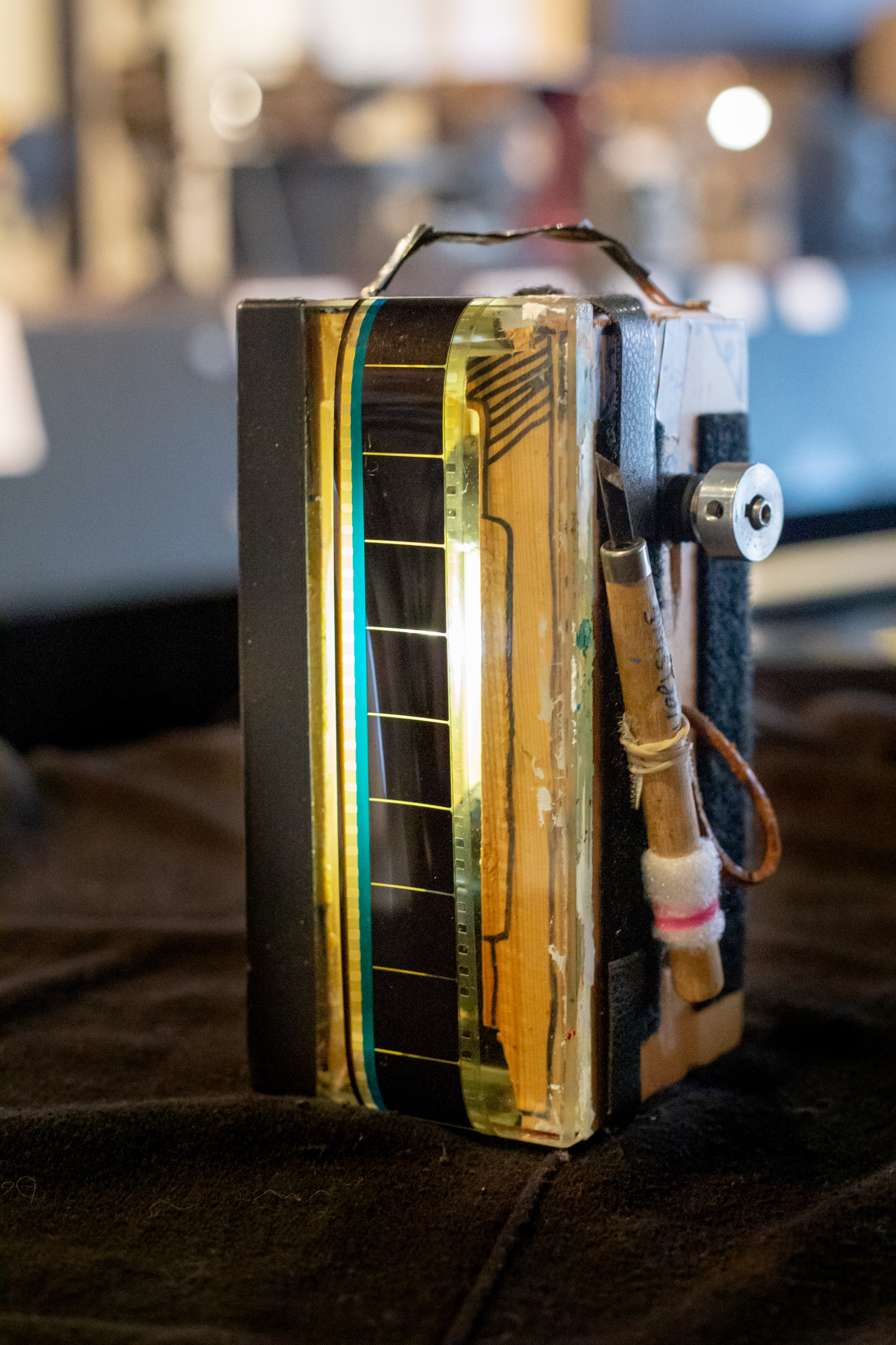 Portable scratch box used by the film animator and a pioneer of drawn-on-film animation Steven Woloshen.